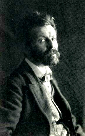 Porträt des Schriftstellers Richard Dehmel.